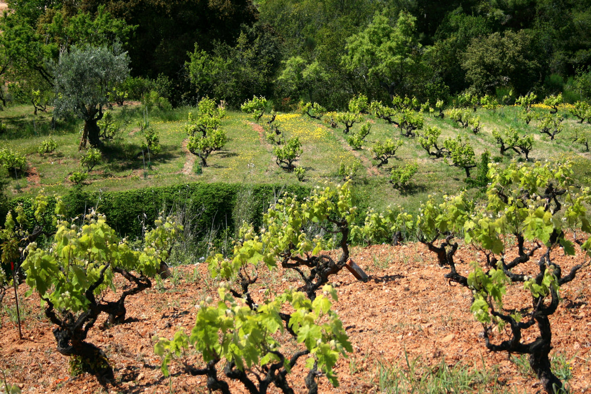 Montornès del Vallès